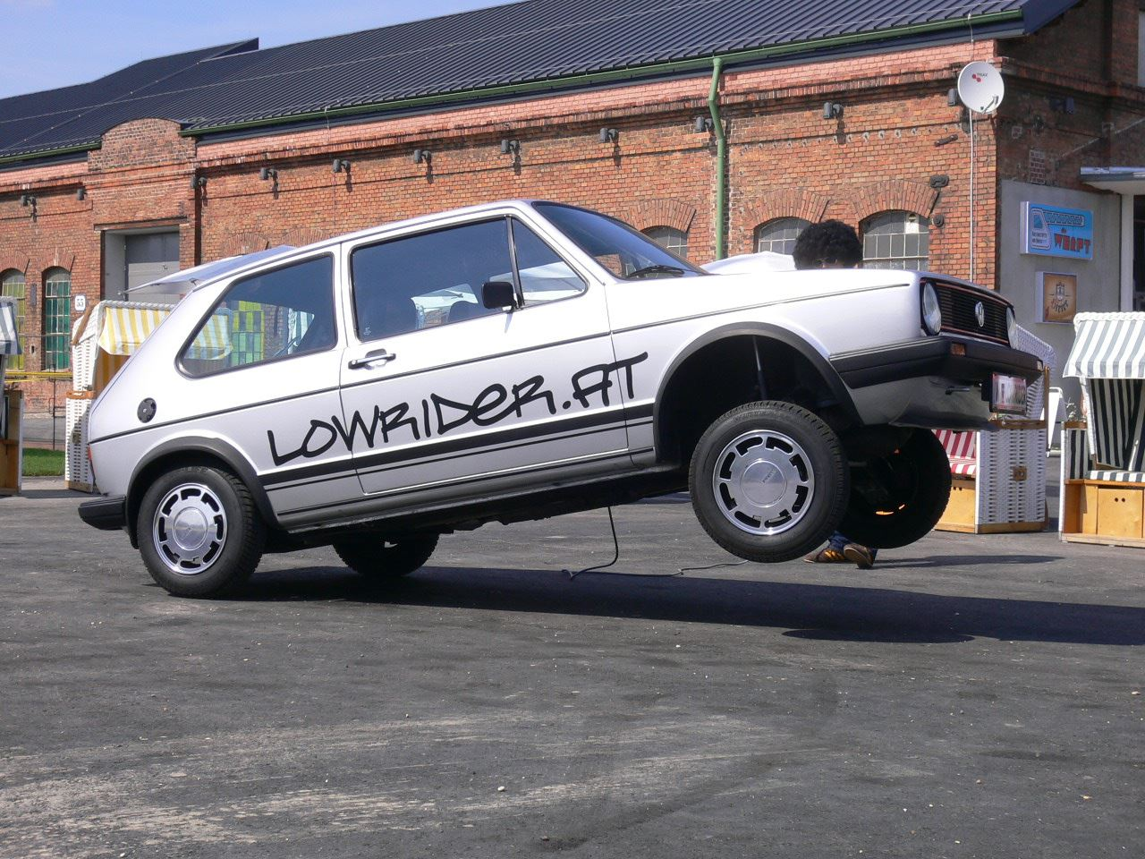 Lowrider Move "Front"